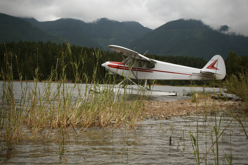 Piper SuperCub